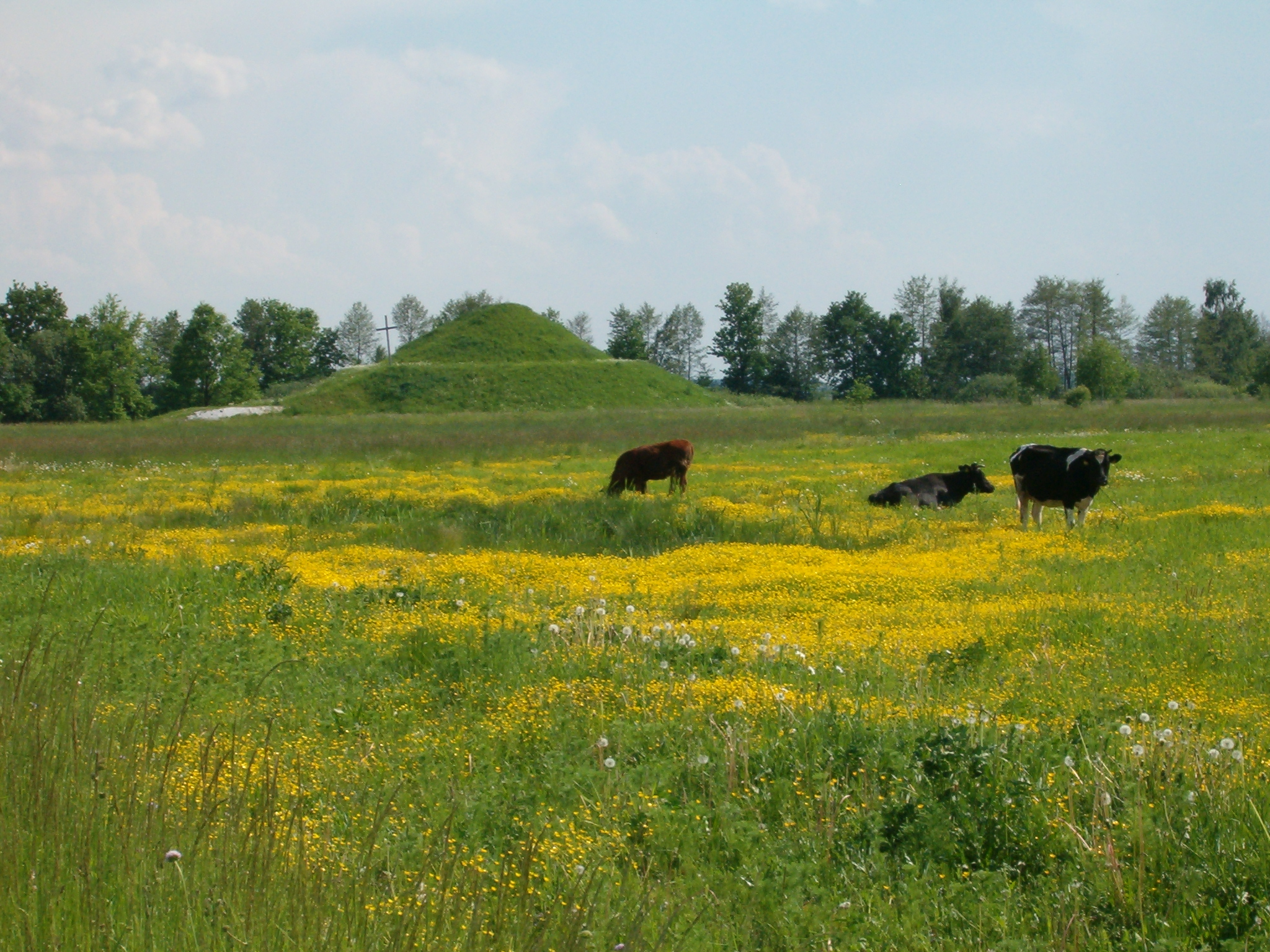 Dymitrów Duży, kopiec Sursum Corda